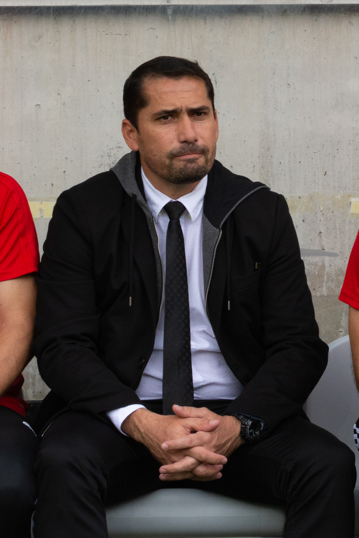 Gustavo Morínigo